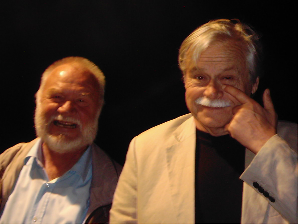 Die beiden Veteranen Siegfried Zill und Vlastimil Hort erzählen Witze und Anekdoten aus früheren Zeiten während der Dortmunder Schachtage 2008